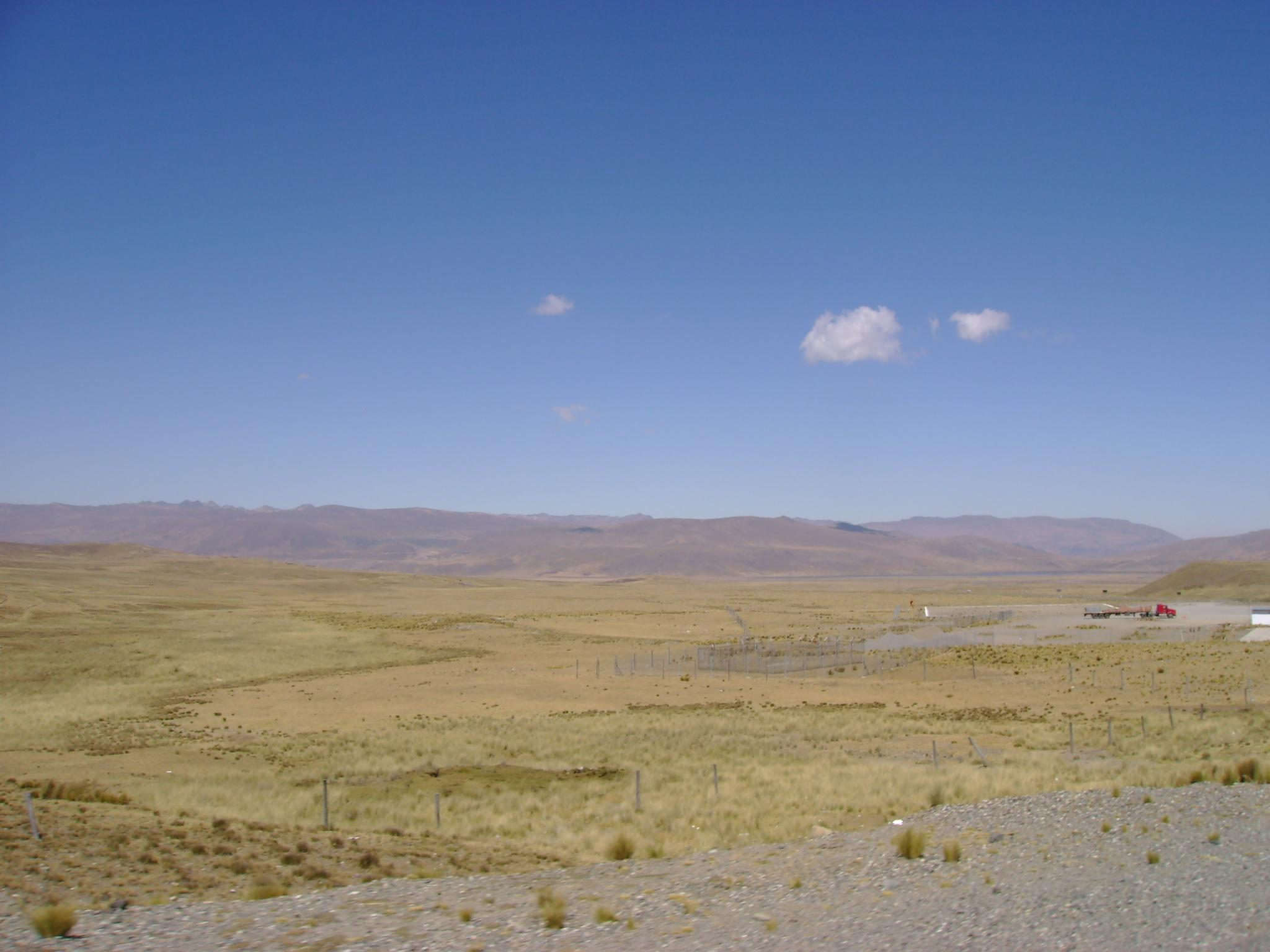 Conococha vista panoramica hacia el suroeste.